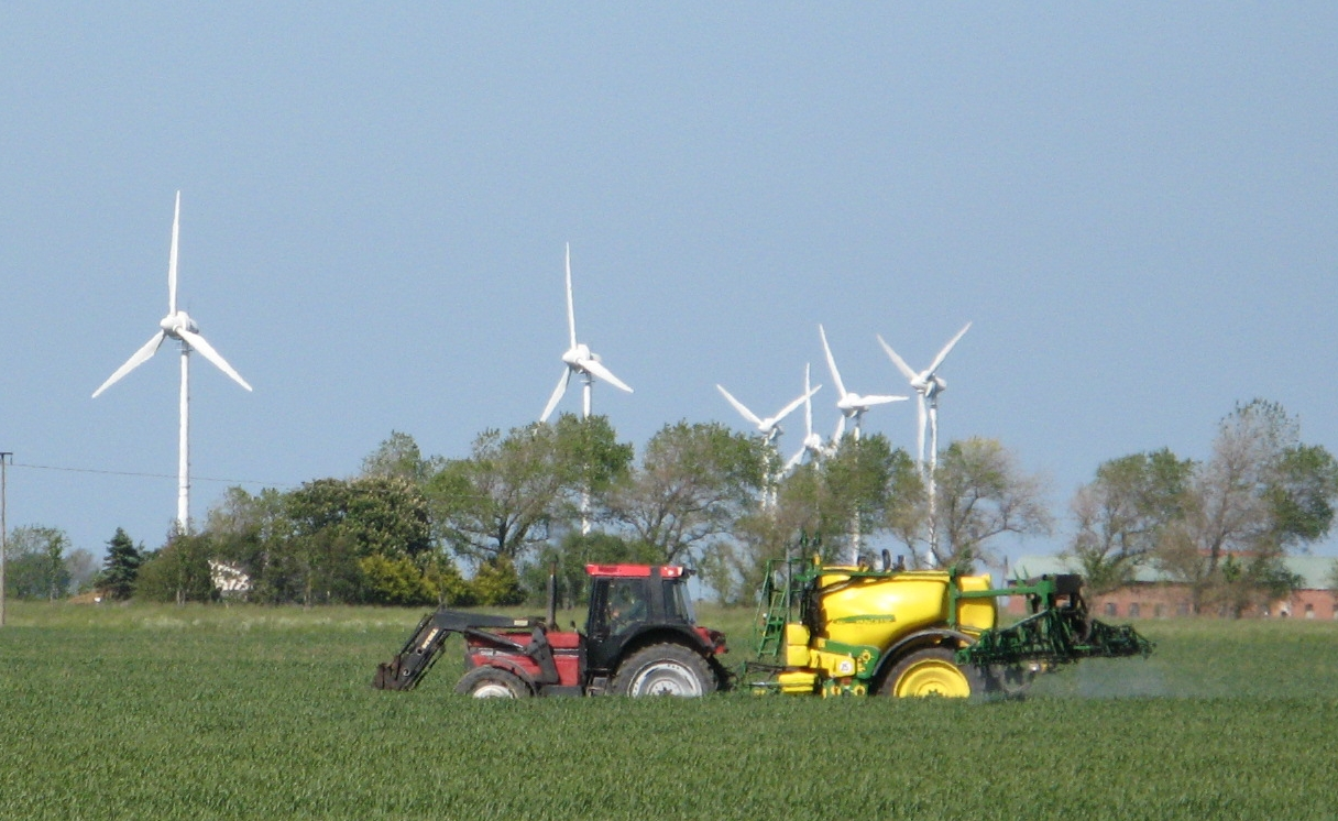 Case-Traktor mit Stoll-Frontlader und John-Deere-Anhängespritze auf einem Feld in Hillgroven, Dithmarschen